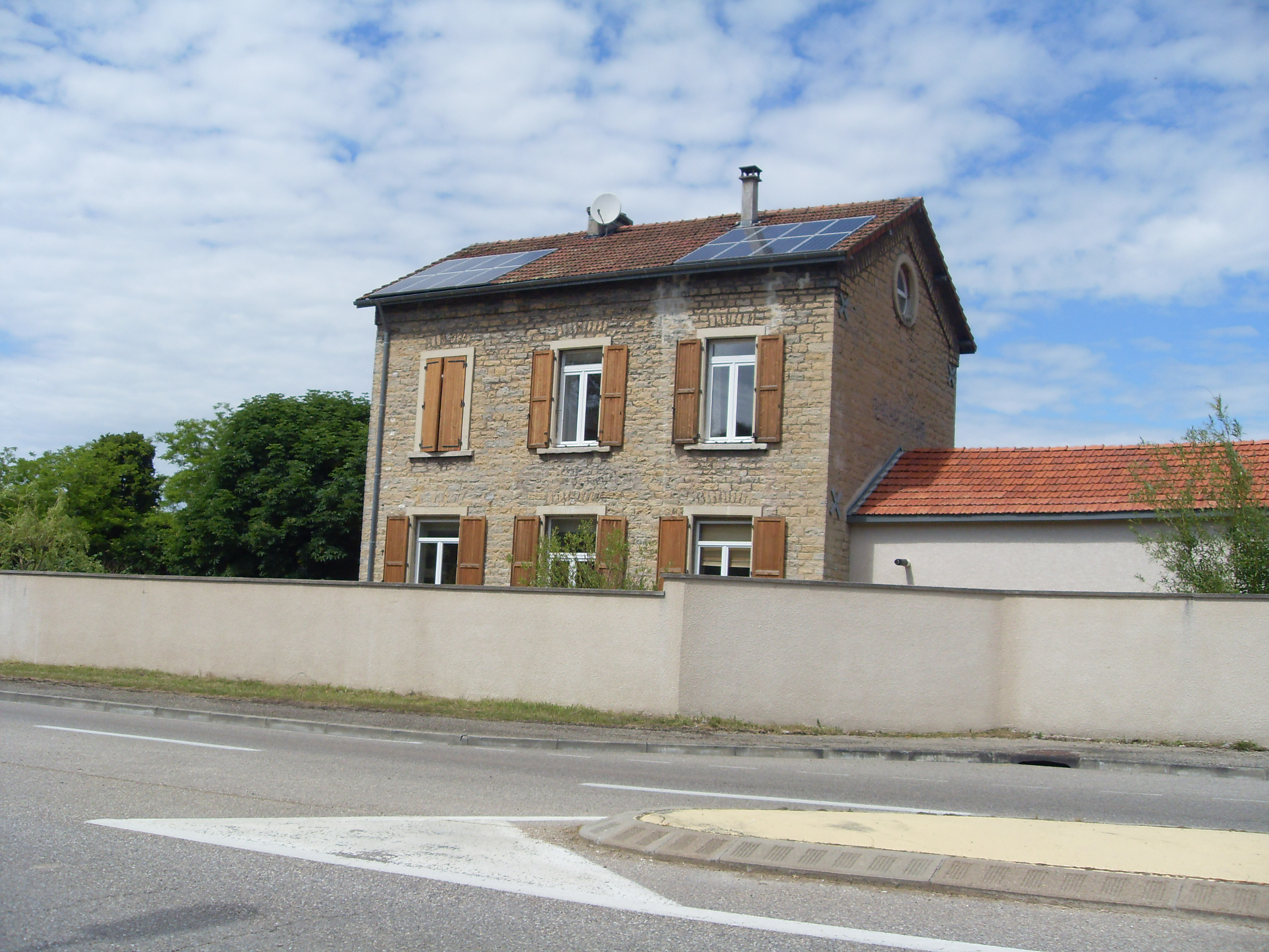 Ancienne gare du Chemin de fer de l'Est de Lyon à Saint-Hilaire-de-Brens.